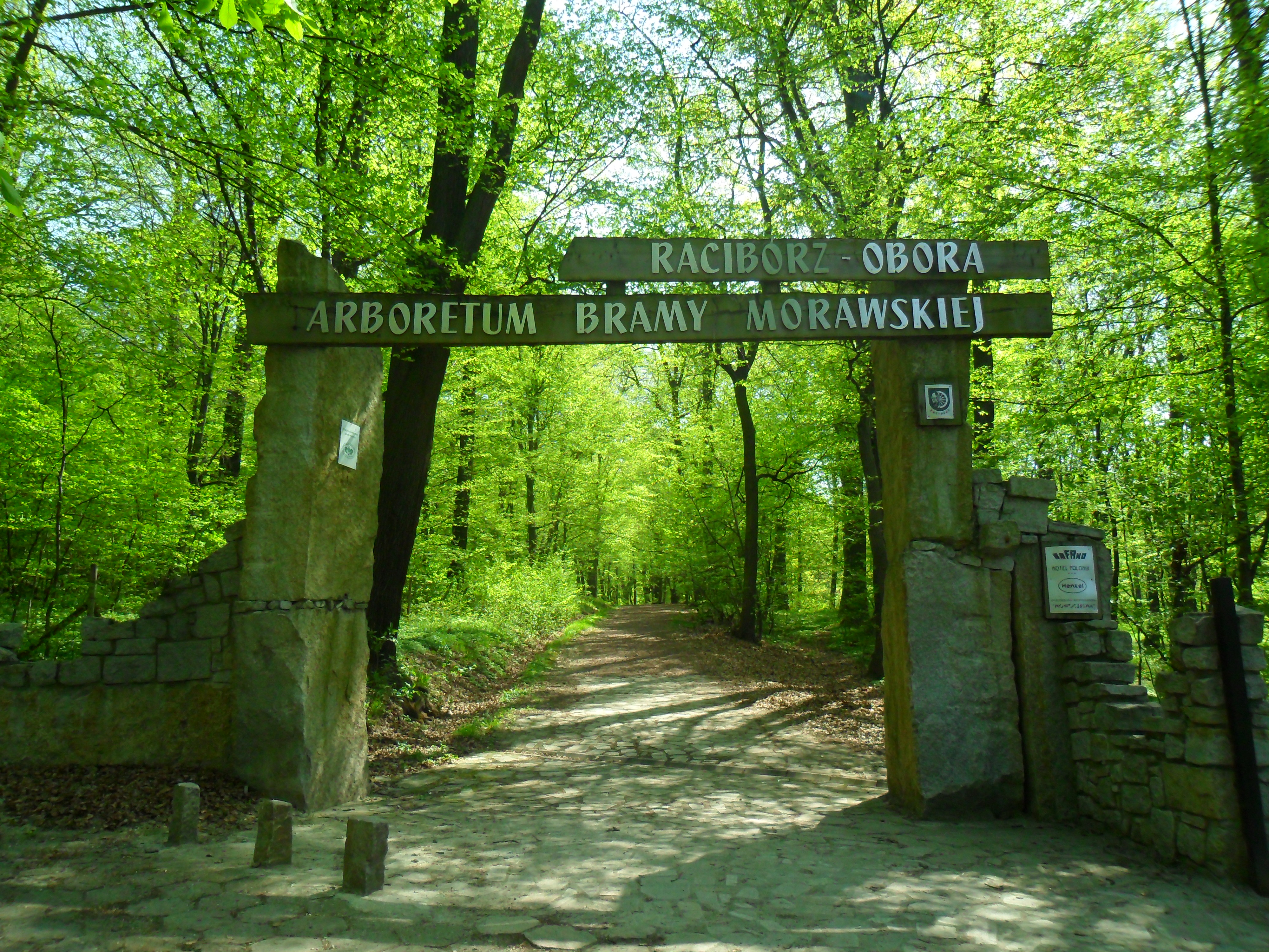 Wejście do Arboretum Bramy Morawskiej w Raciborzu.